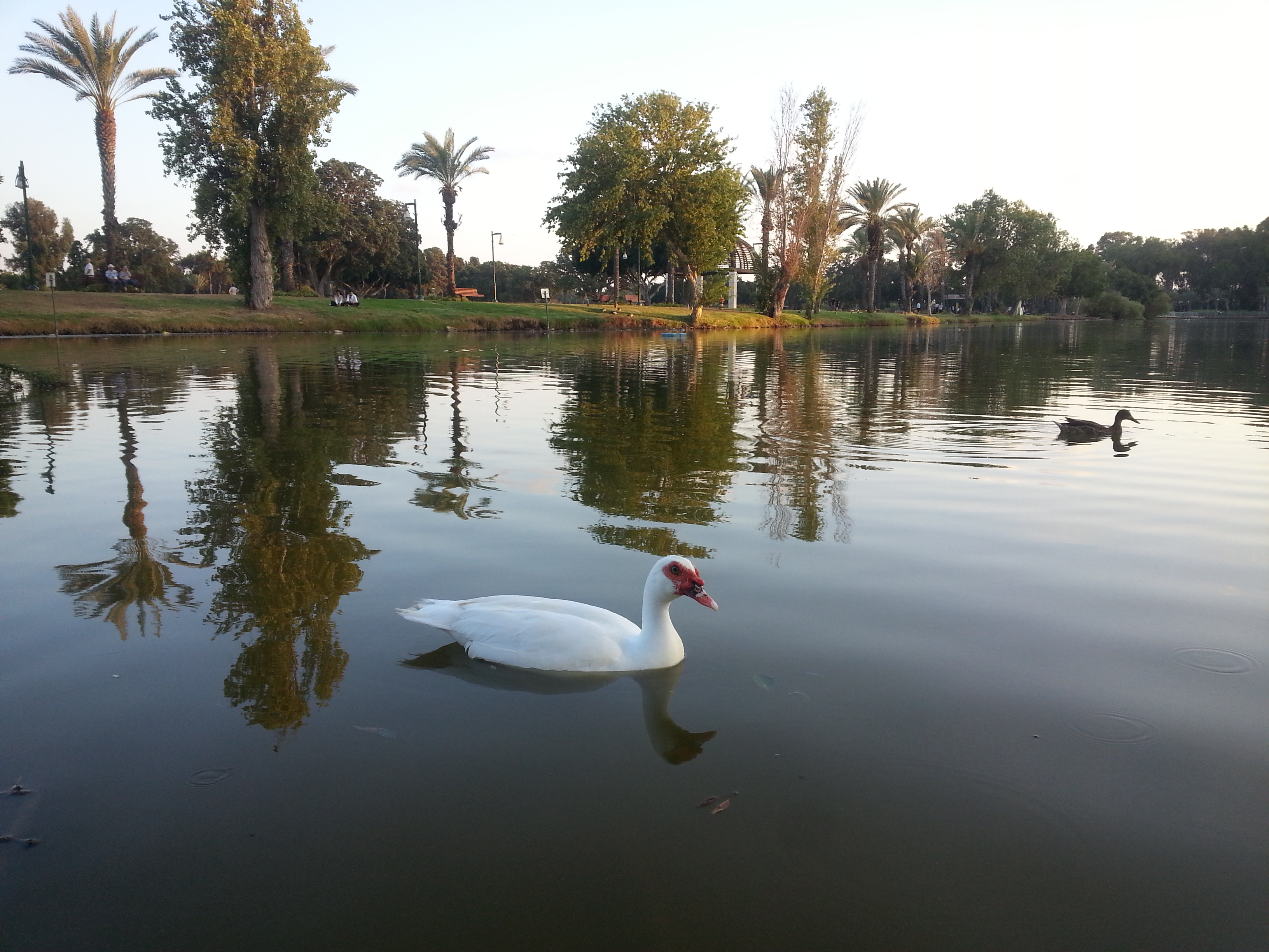 עוף מים לבן בפארק רעננה